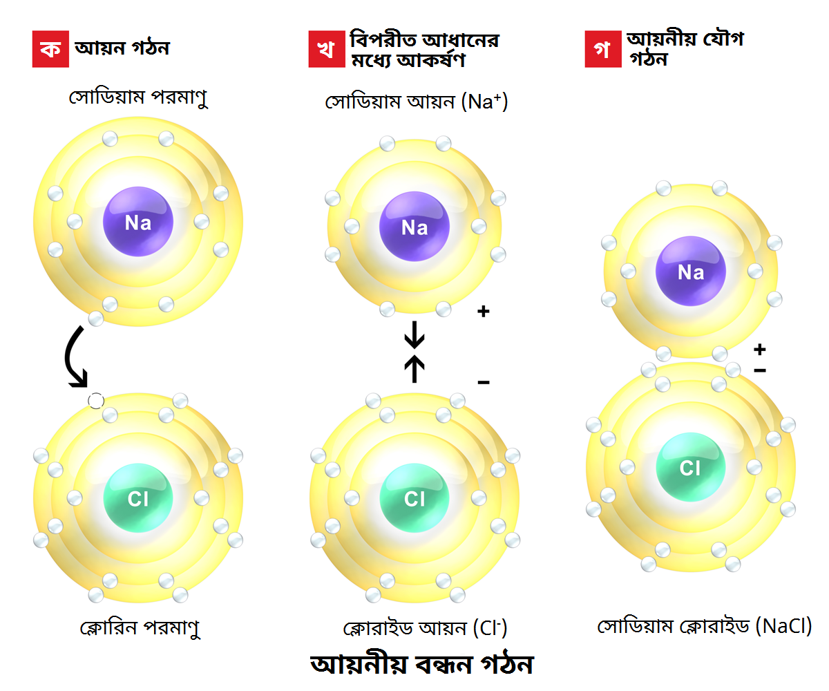 আয়নীয় বন্ধন গঠন